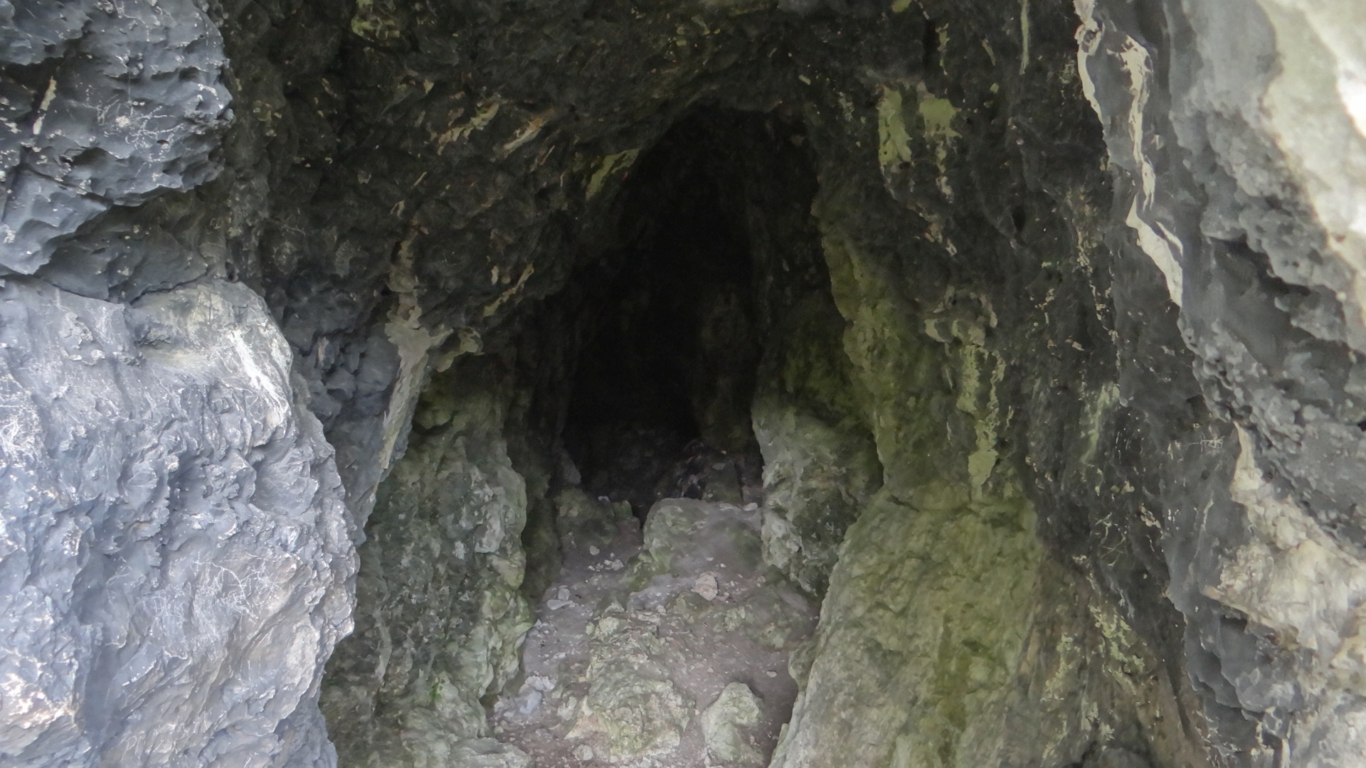 Schronisko Pierwsze w Wąwozie Ostryszni w Imbramowicach